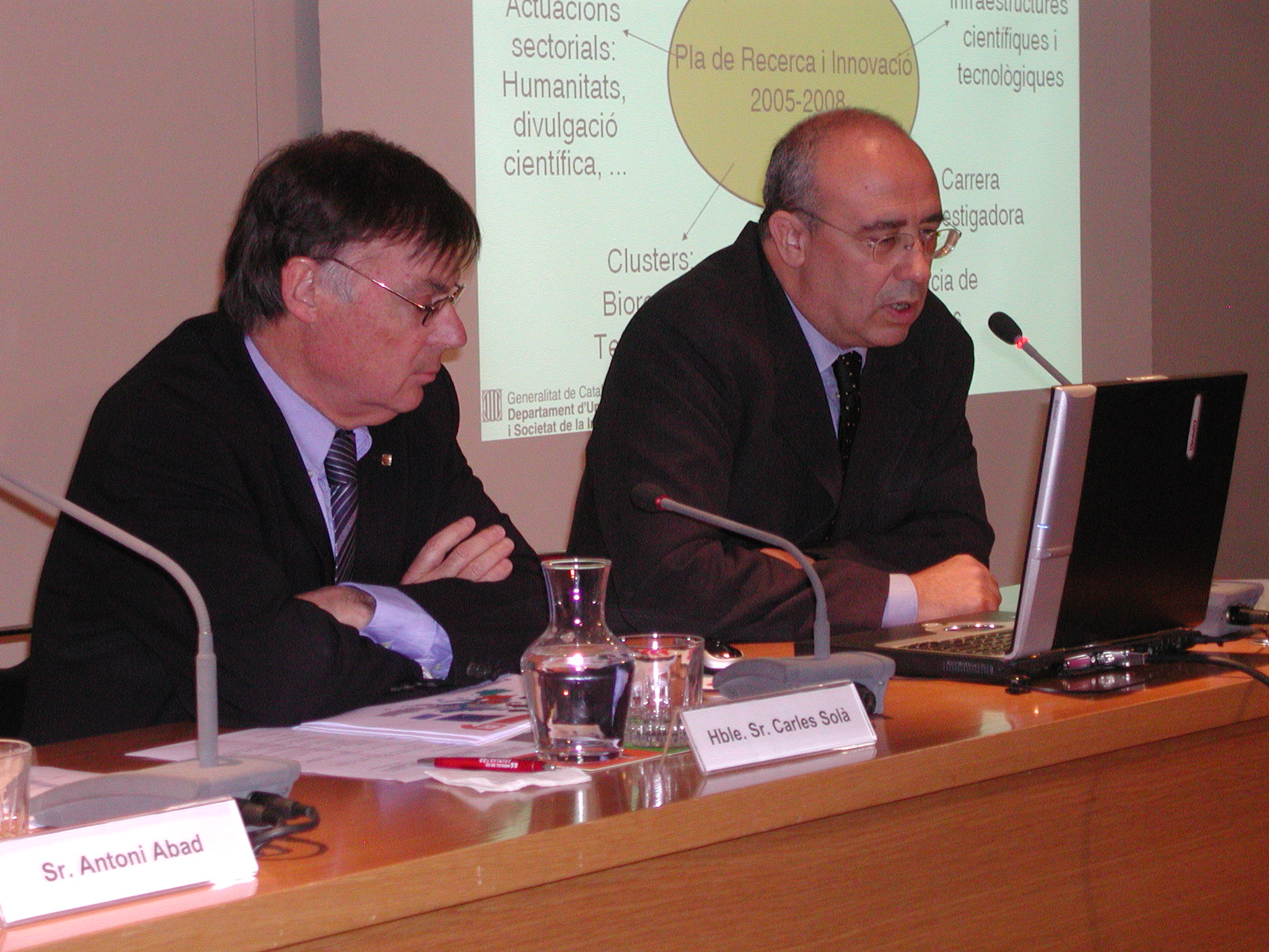 Francesc Xavier Hernàndez (Director General de Recerca de la Generalitat, 2003-2006)